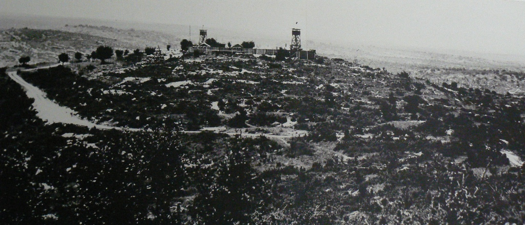 Kibbutz Hanita: Tower and stockade settlement 1938